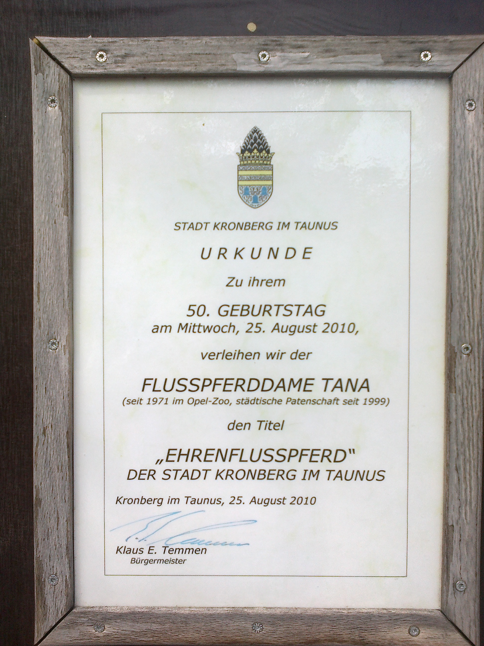 Verleihungsurkunde zum "Ehrenflusspferd" der Stadt Kronberg